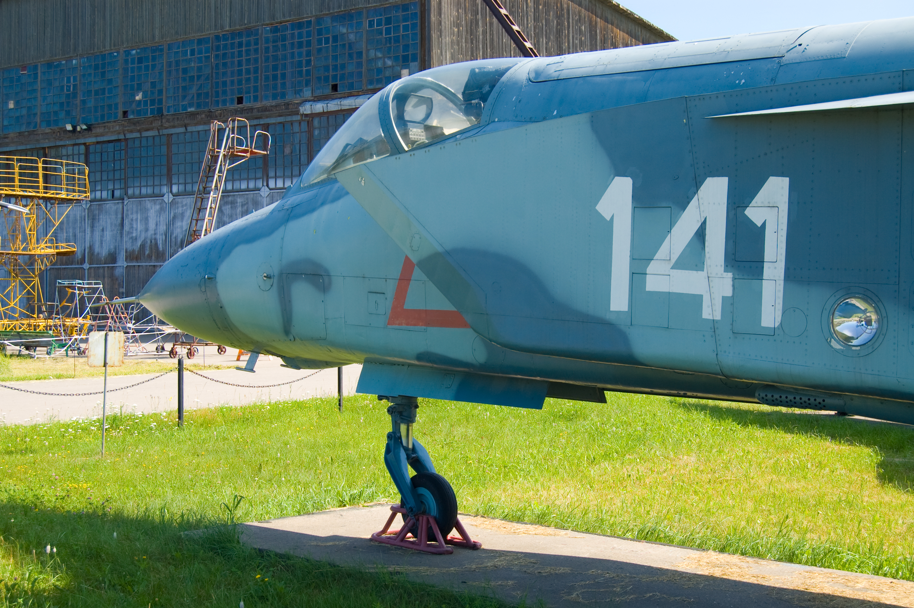 Yakovlev Yak-141